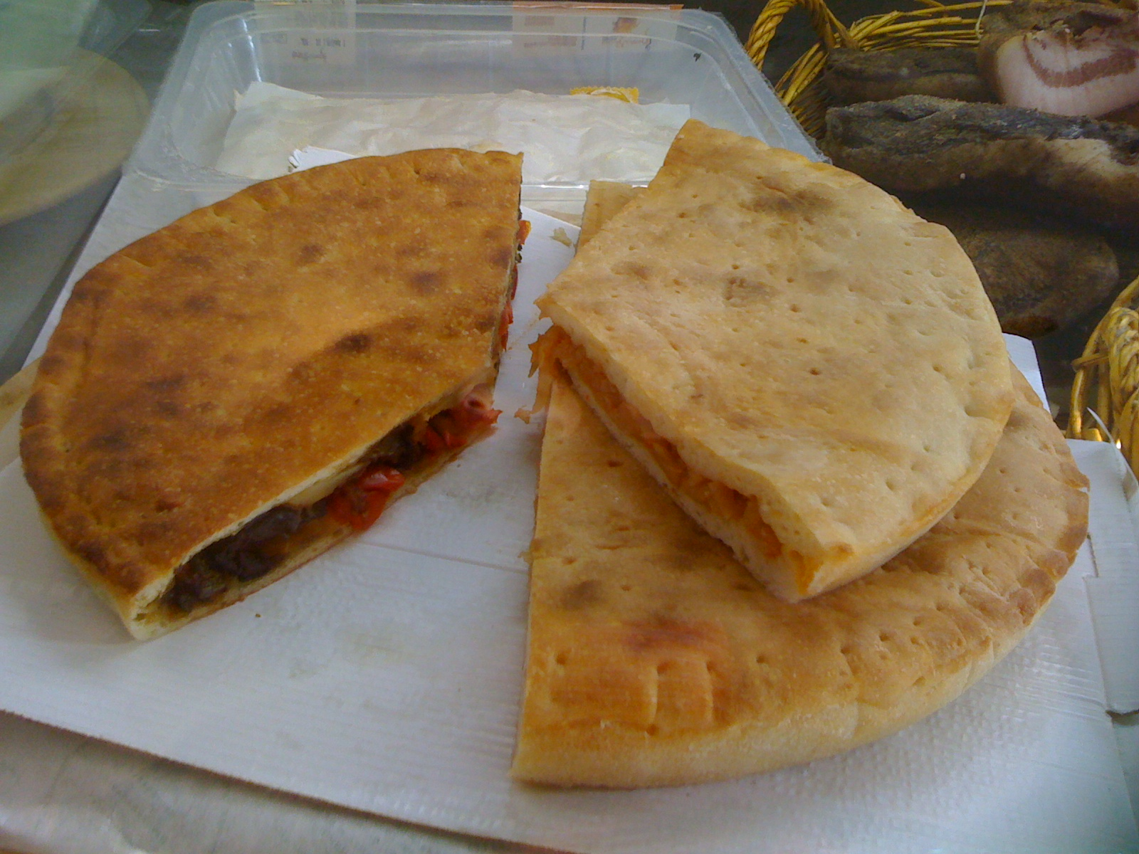 la tiella di Gaeta!!! scatti presso il mitico e gustosissimo DOL